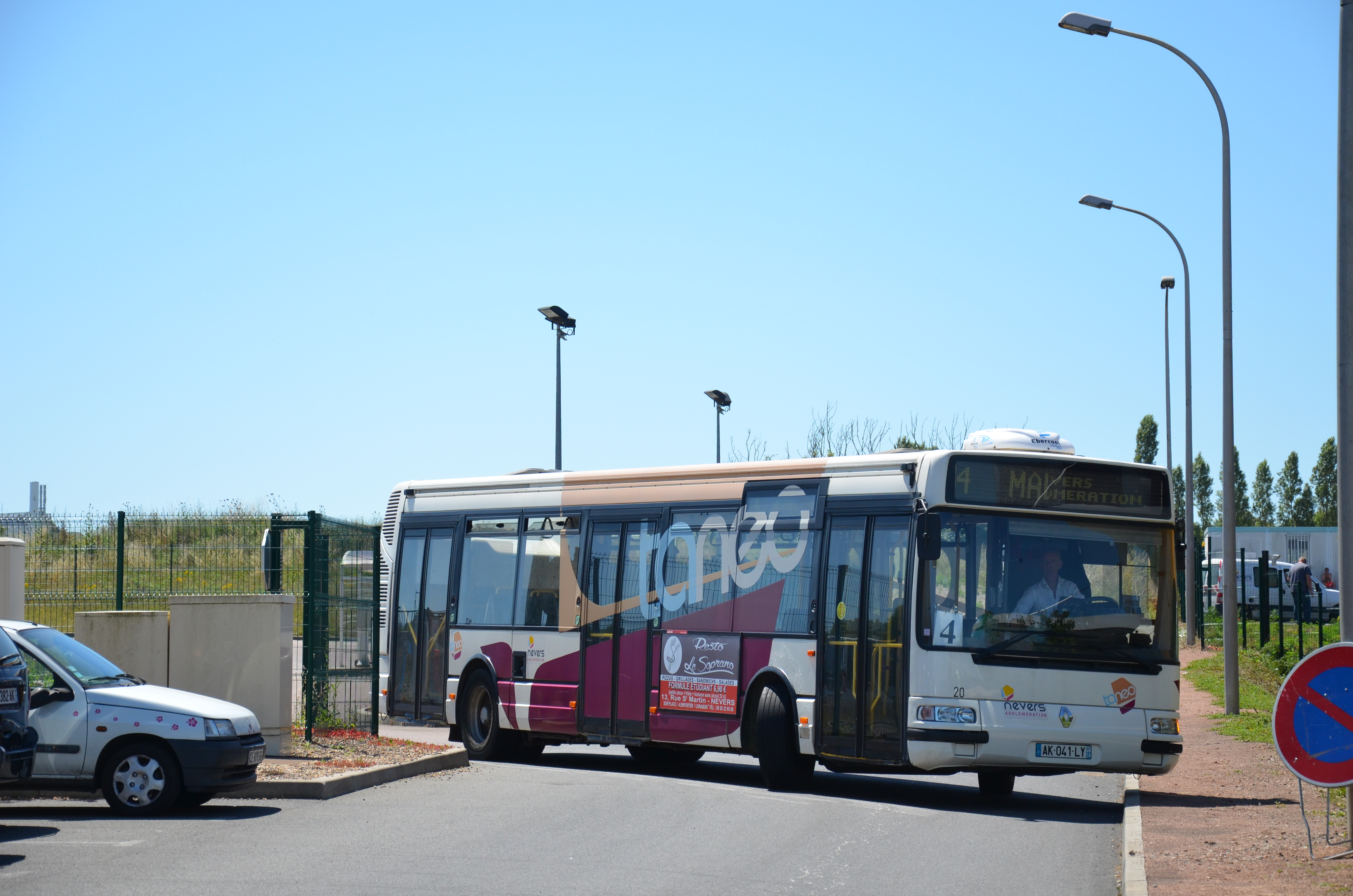 Renault Agora S n°20 sortant de son retournement dans le dépôt de Nevers Agglomération.